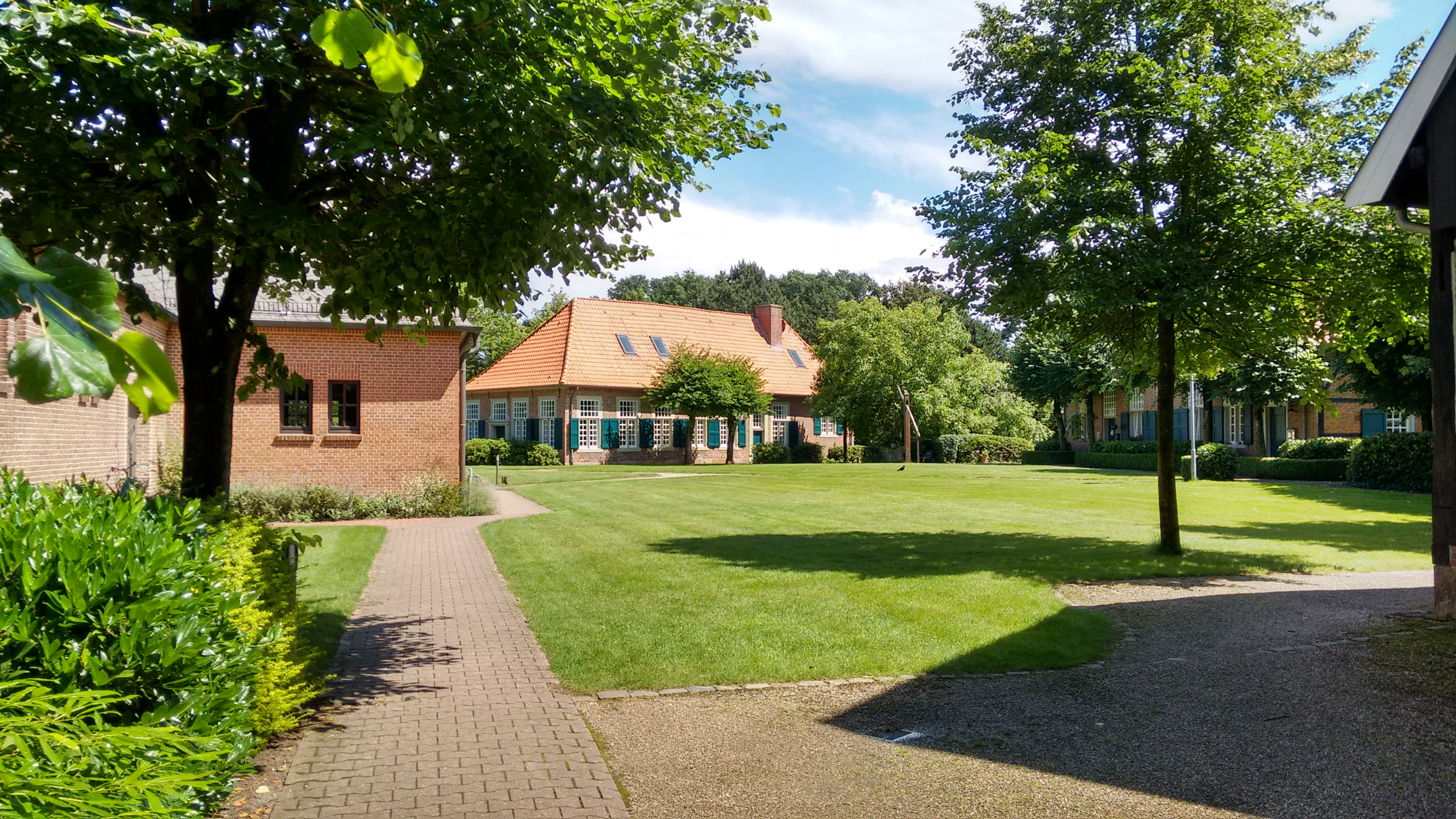 Stiftsbereich Wietmarschen